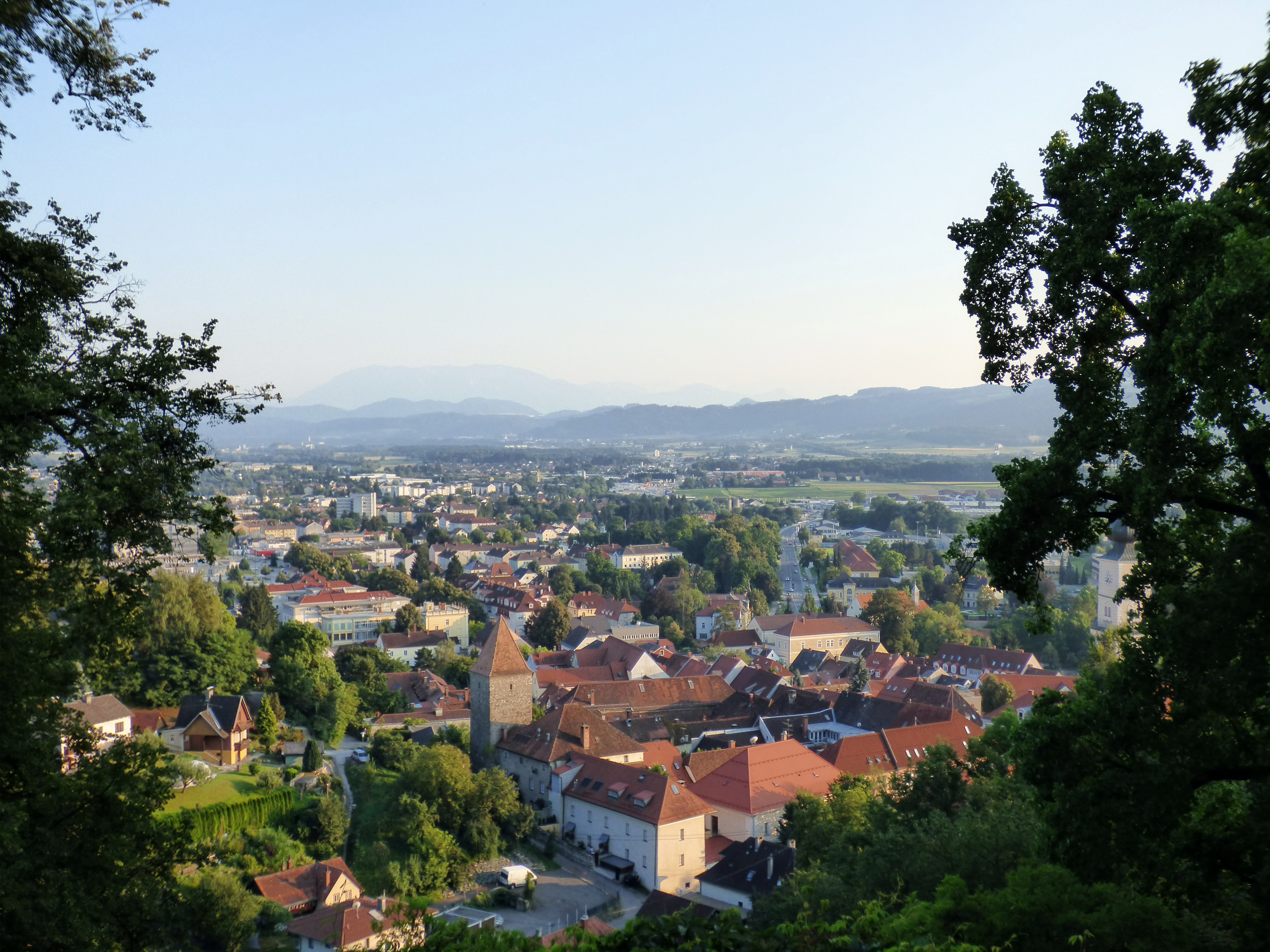 Wolfsberg (Kärnten), Blick vom Schloss Richtung Getreidemarkt